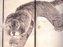 Photo prise durant une exposition a Nara. L'œuvre date de 1786.